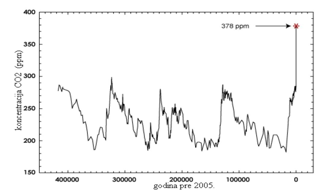 Српски (ћирилица): Концентрација ЦО2 у периоду од пре 420.000 година до 2005.